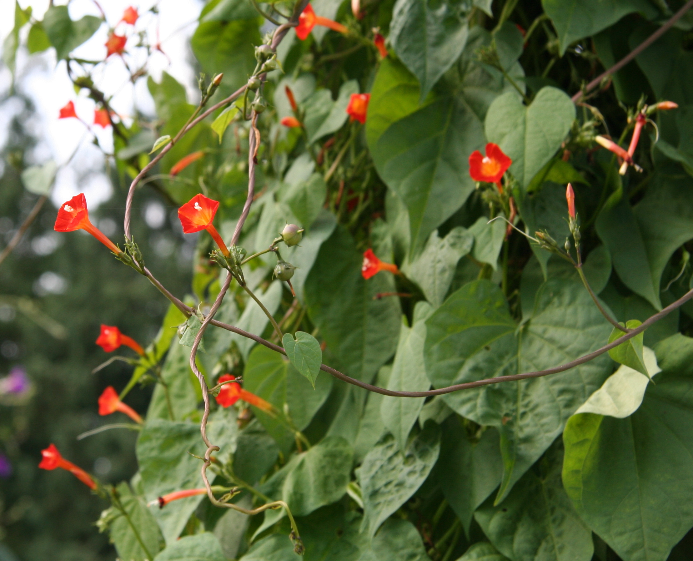 Ipomoea coccinea im Botanischen Garten Dresden